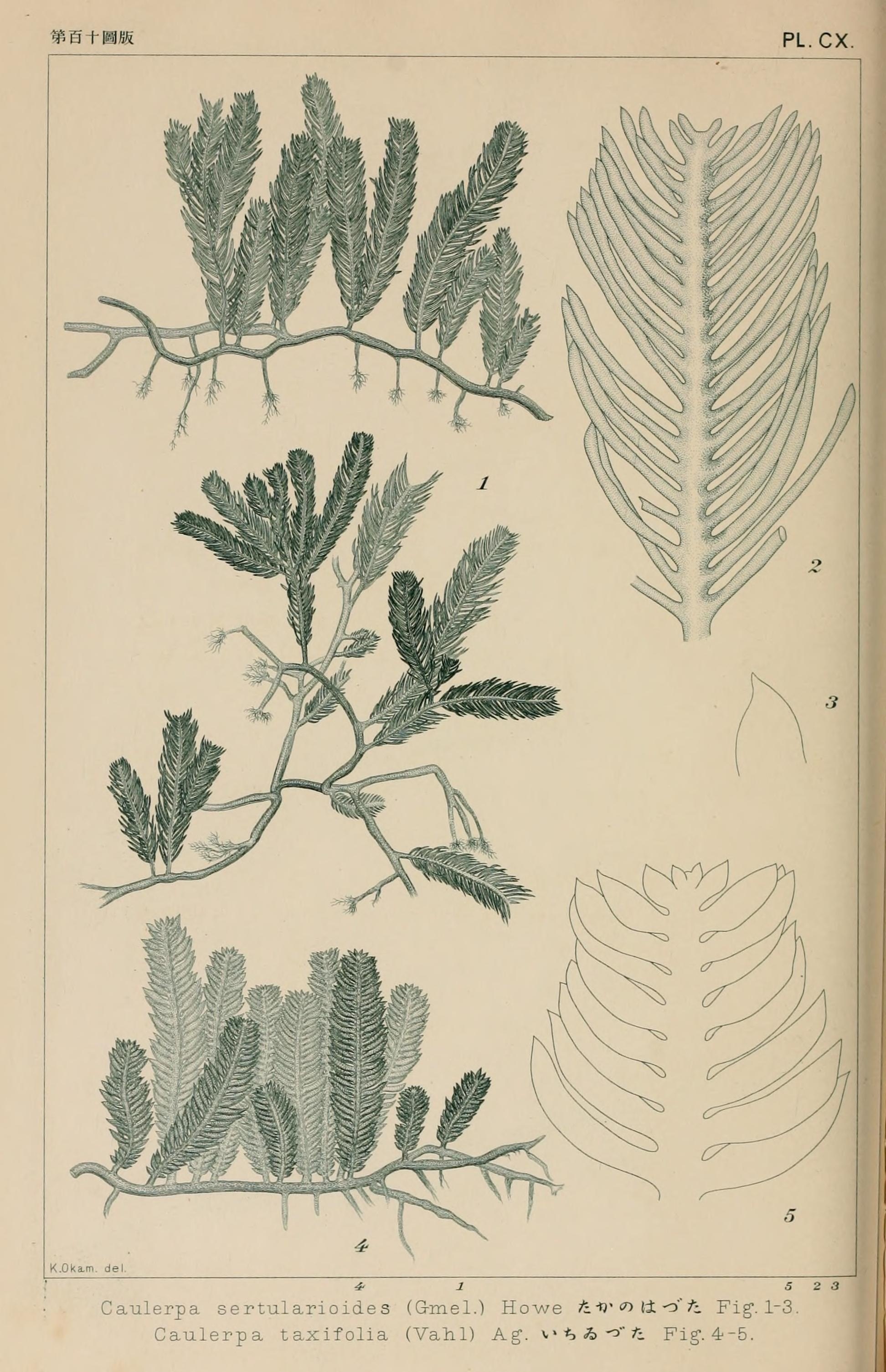 PL. CX. Caulerpa sertularioides (G-mel.) Howe ' .r. ! o" ^. Fig 1 . 1-3. Caulerpa taxifolia (Vahl) Ag". \..*-o-/i Fig 1 . 4-5.